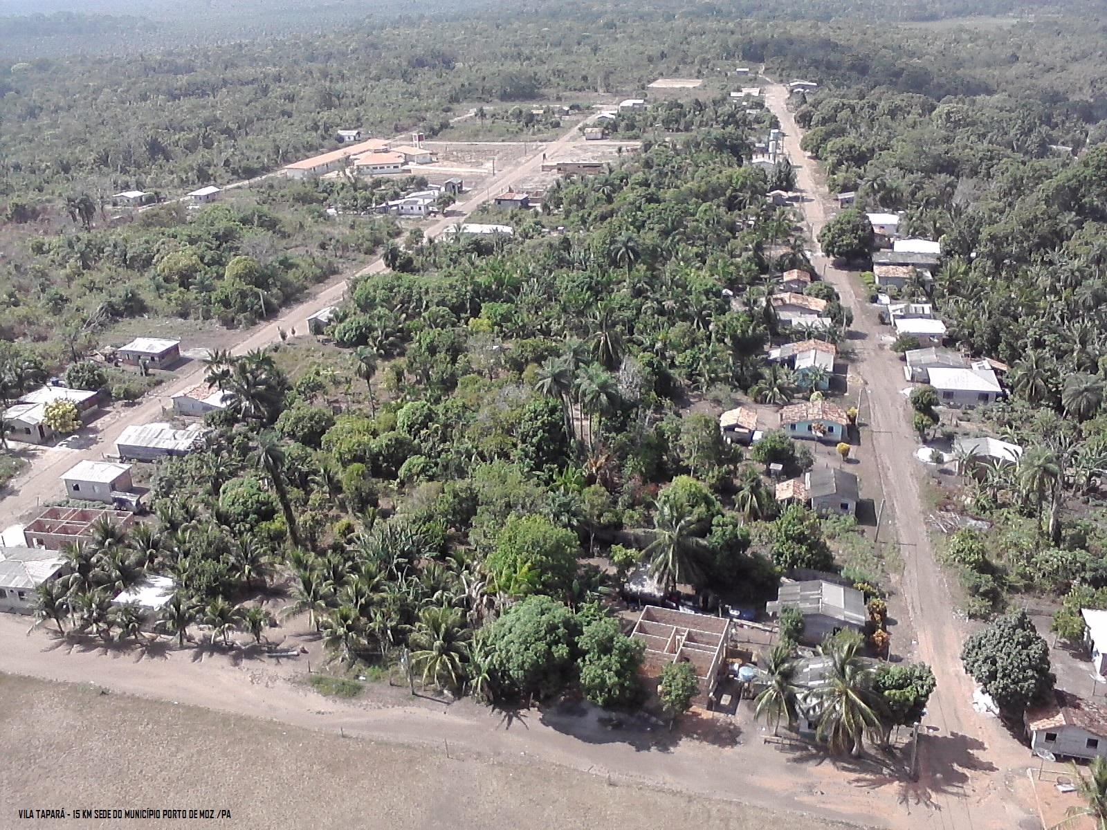 Porto de Moz - State of Pará, Brazil